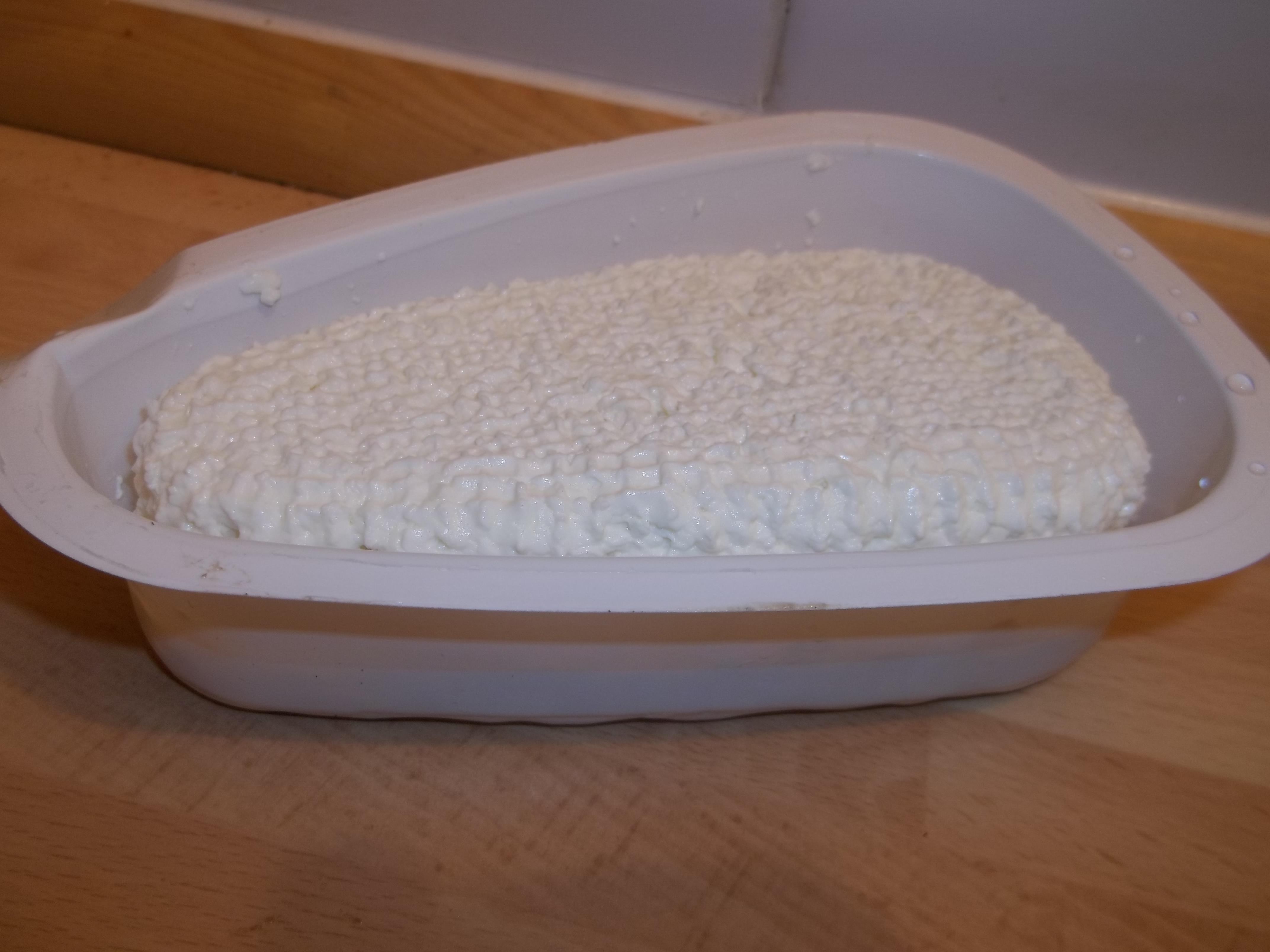 Varškės sūris